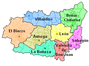 Áreas Funcionales de León (Castilla y León)